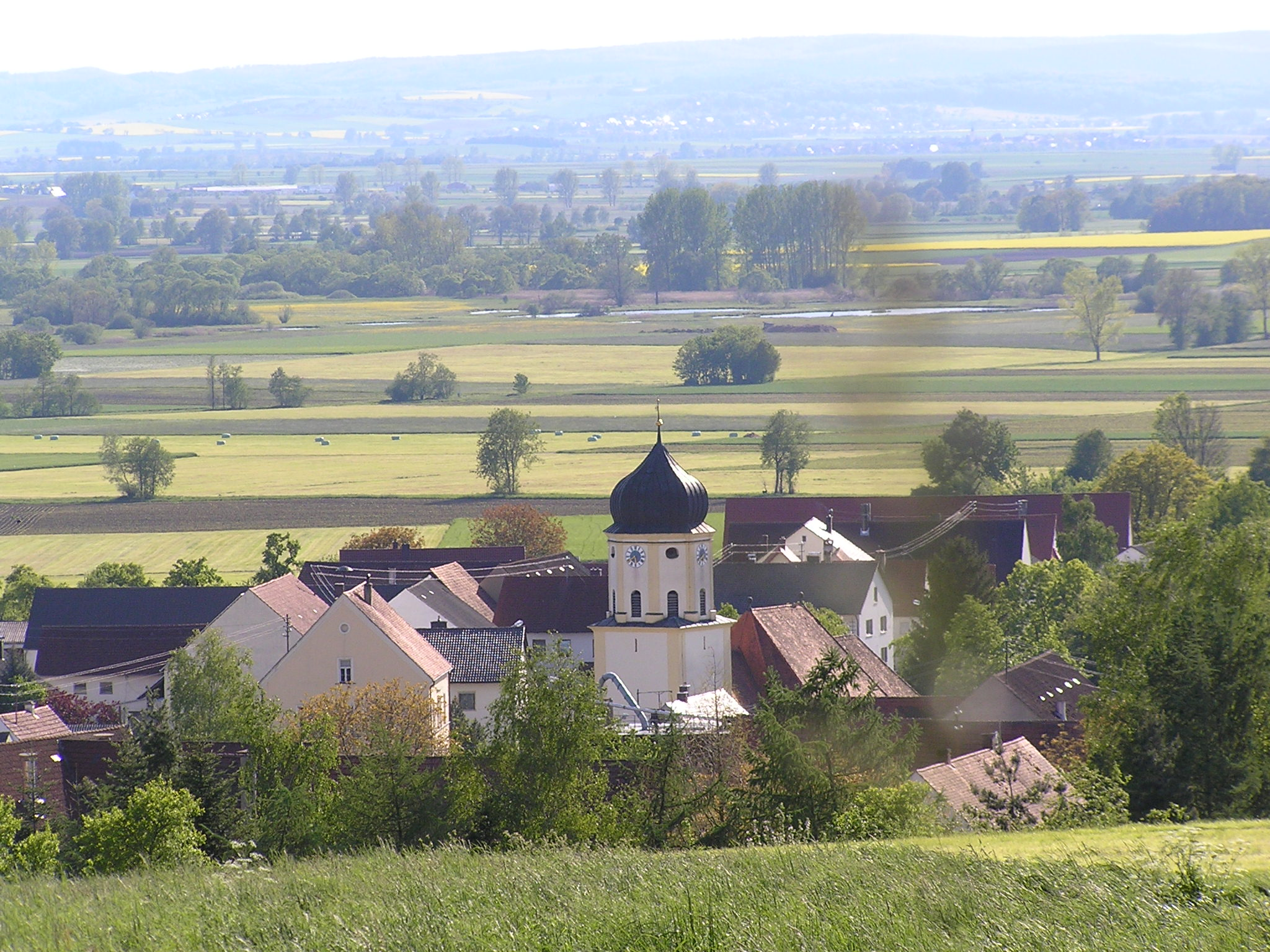 Aufnahme vom Hessenbichel auf Amerbach. Im Hintergrund ist das Ries und im Hintergrund der südliche und östliche Rieskrater zu sehen.